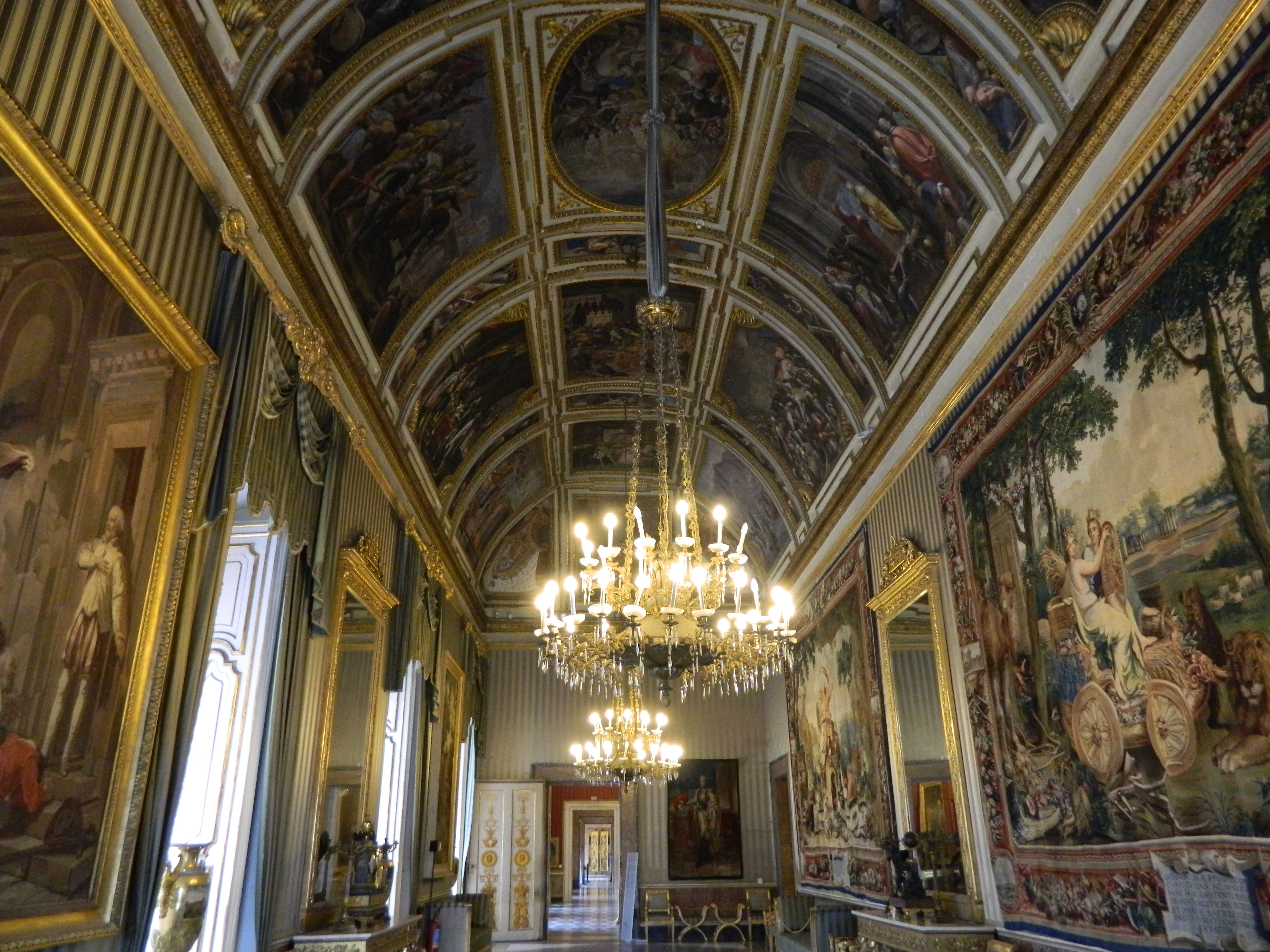 Palazzo Reale di Napoli - Seconda anticamera di sua Maestà